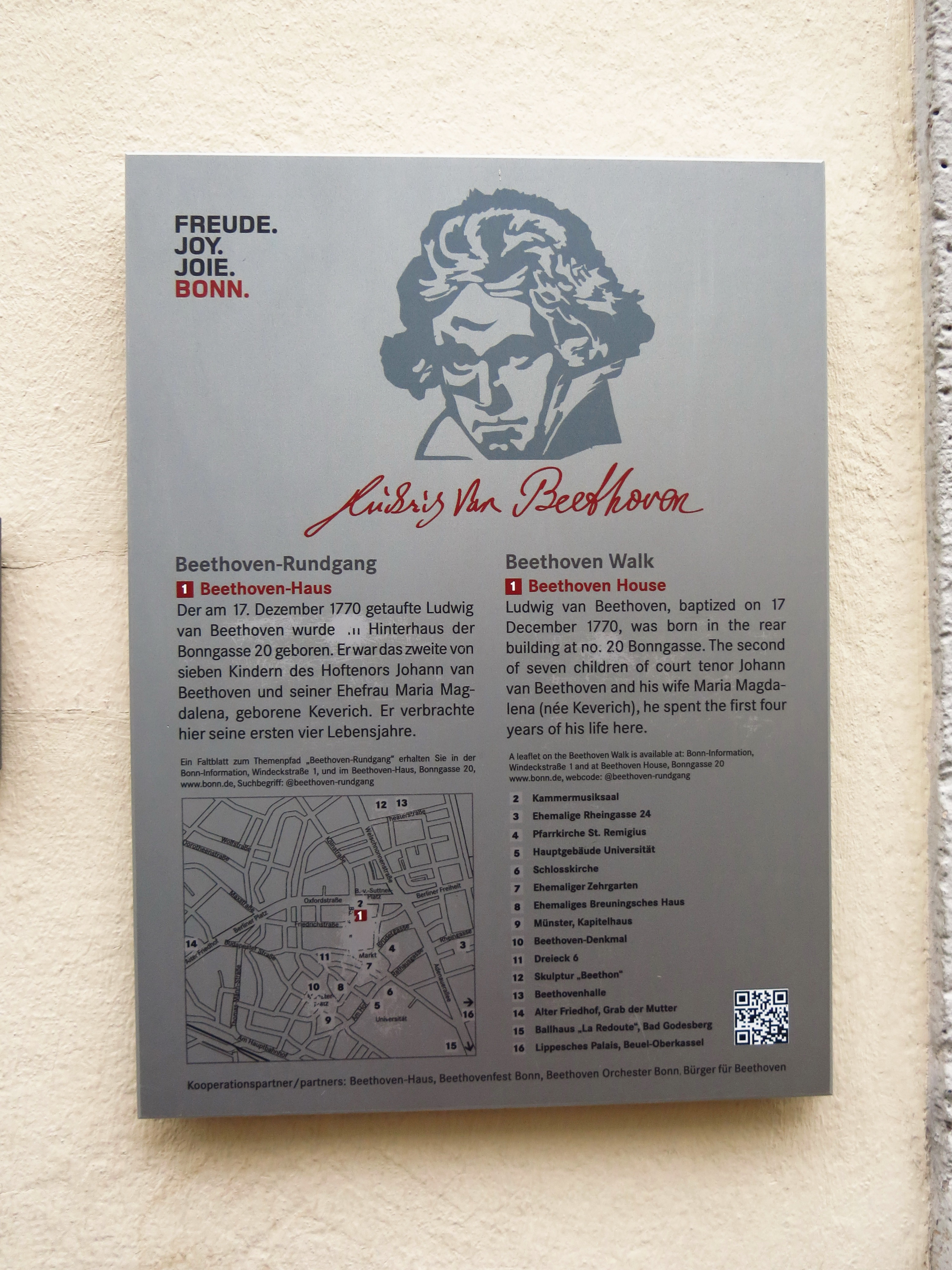 Geburtshaus Ludwig van Beethoven. Station eins des Beethoven-Rundgangs.